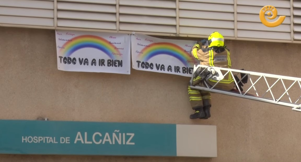 Un bombero coloca carteles con el lema #Todovaairbien en el hospital de Alcañiz.